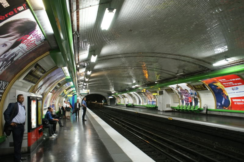 Andenes de la Estación Trinité - d'Estienne d'Orves